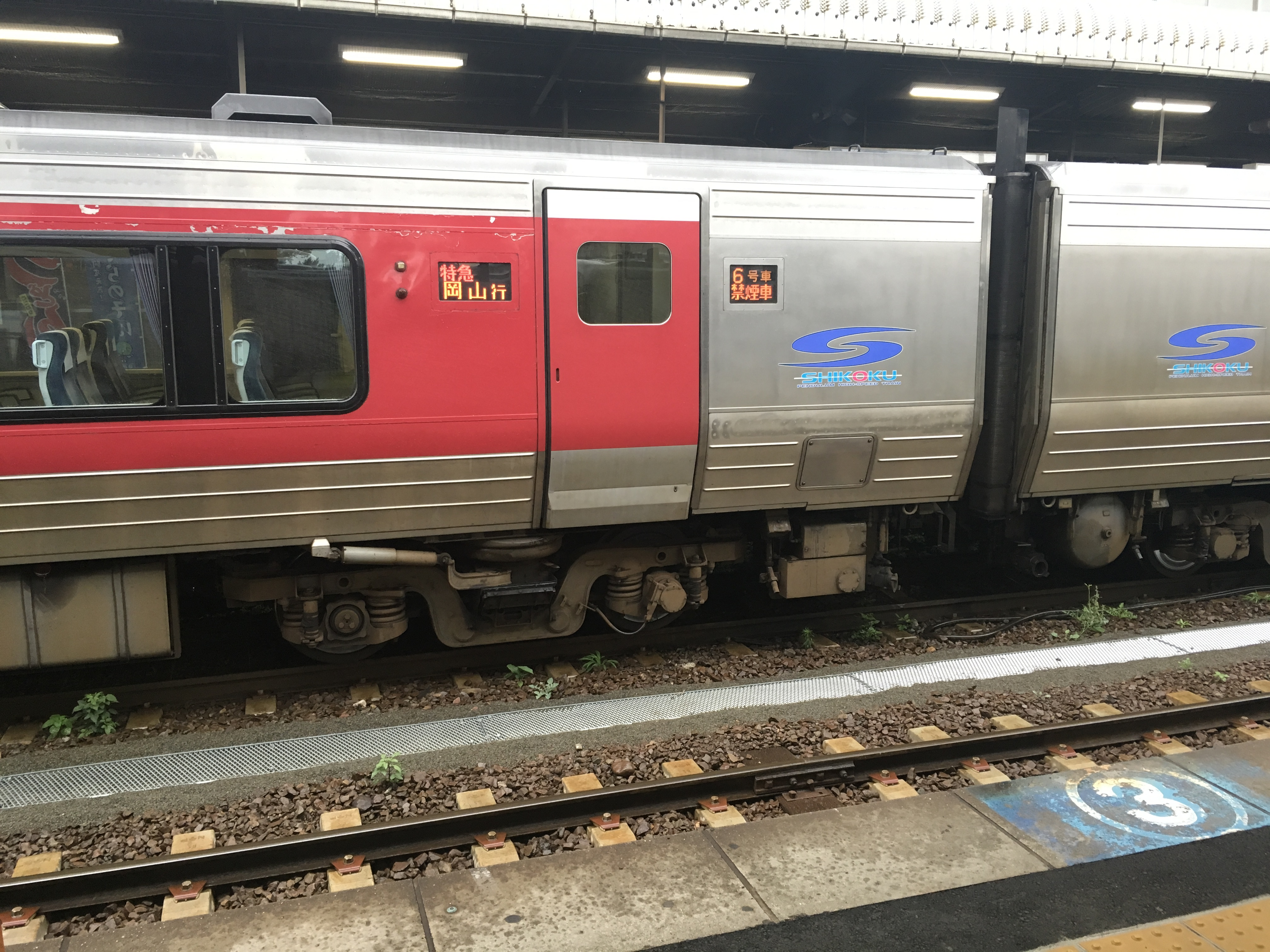 中文（中国大陆）: 2000系因其独特的振子装置（车体倾斜装置）而出名，这里展示了转向架的外观细节